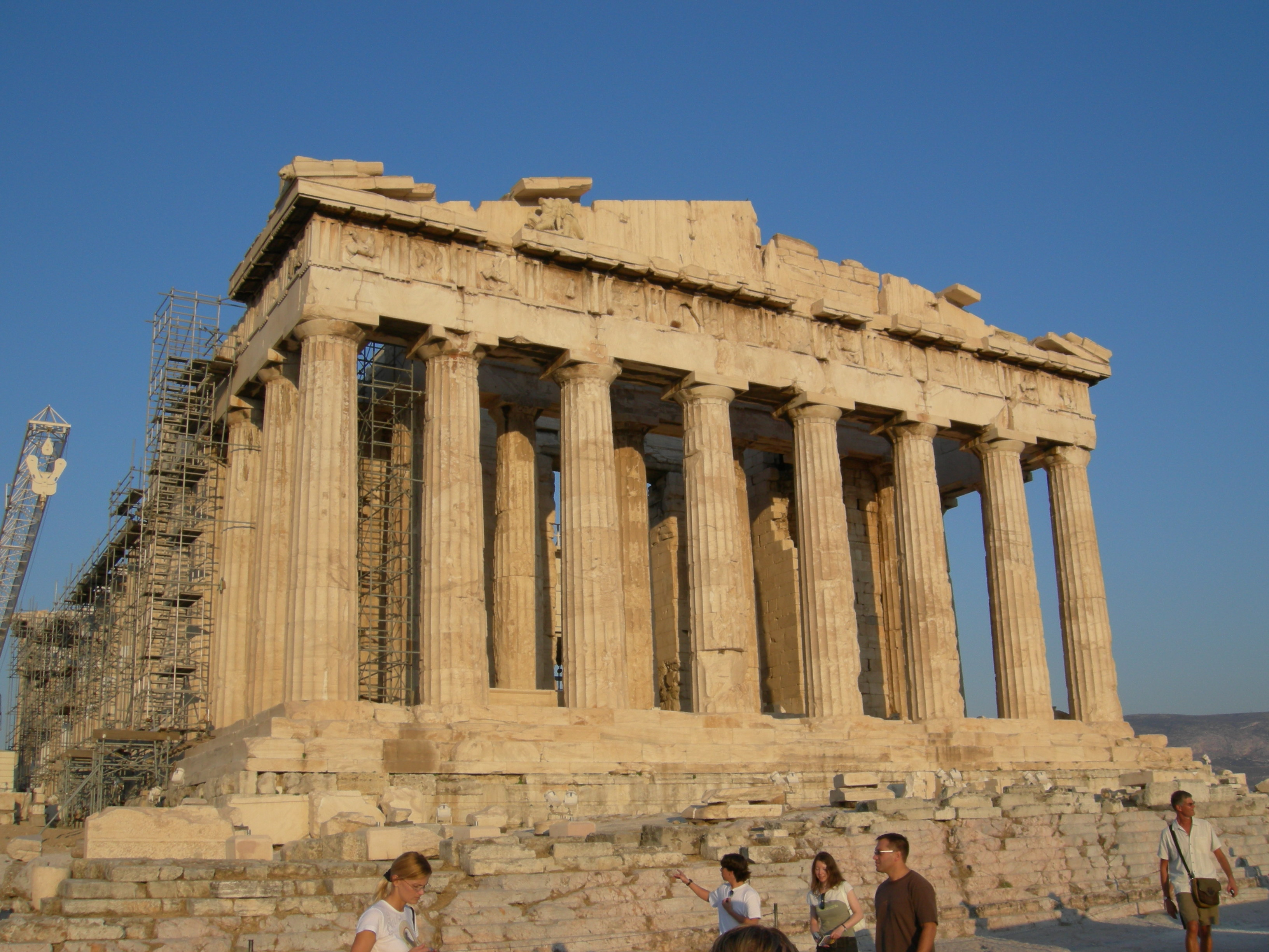 Fotografia del Partenone di Atene. Foto personale. Atene settembre 2006.